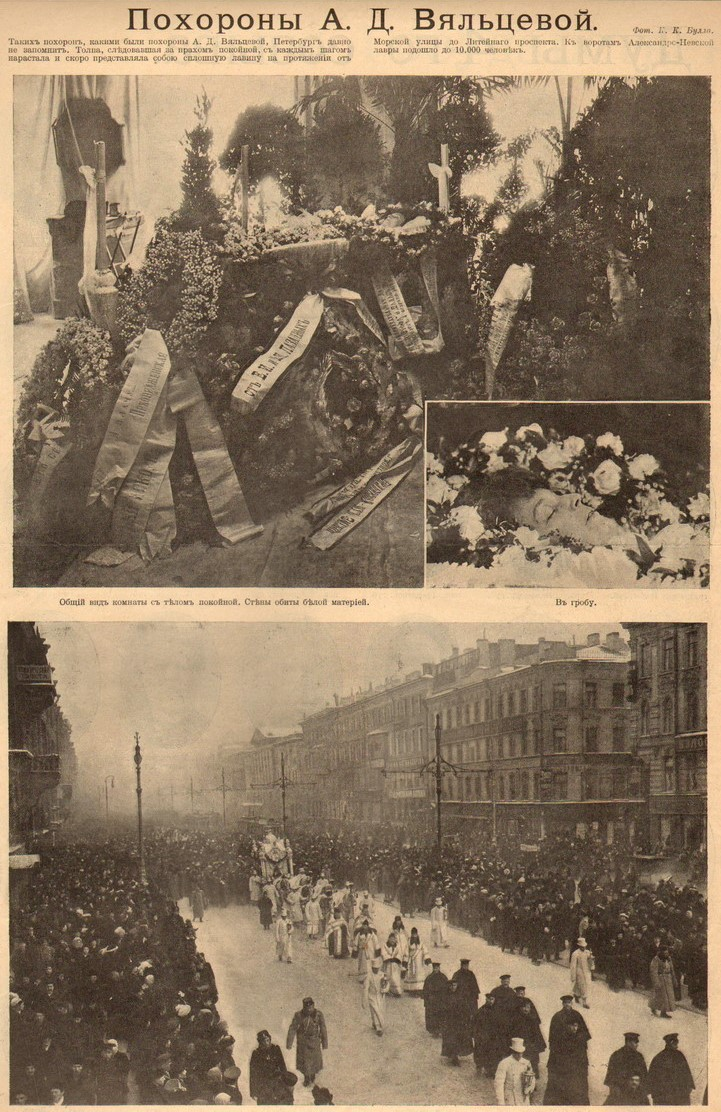 Похороны певицы Вяльцевой А.Д. в Санкт-Петербурге. Февраль 1913г.